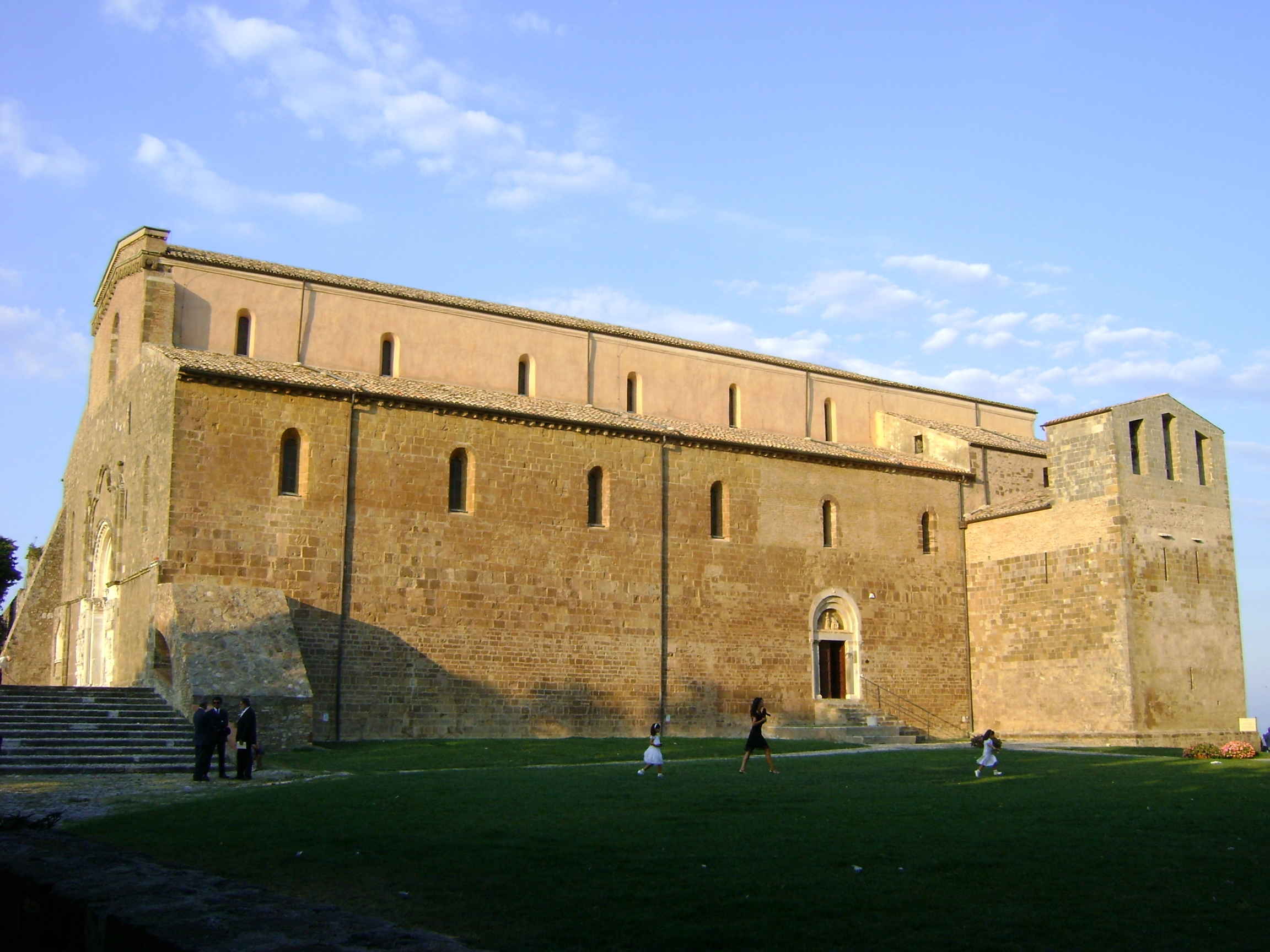 L'abbazia di San Giovanni in Venere, Fossacesia, provincia di Chieti, Abruzzo